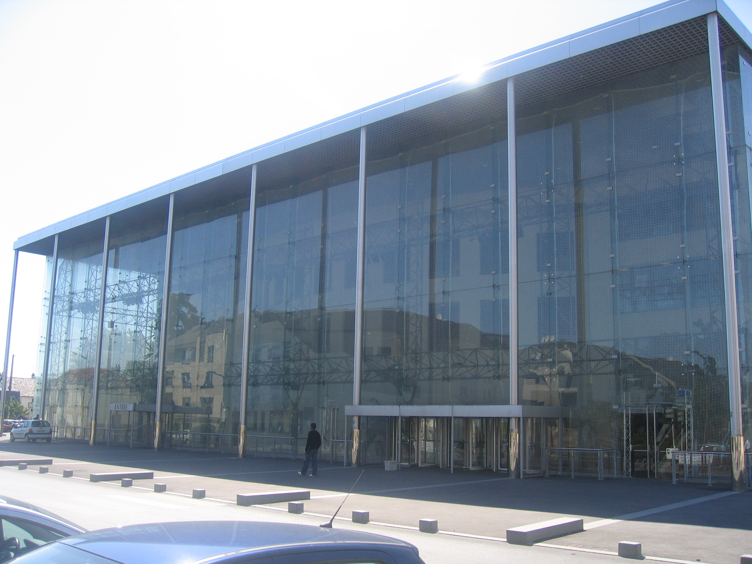 L'Espace Michel Simon in Noisy-le-Grand (France).